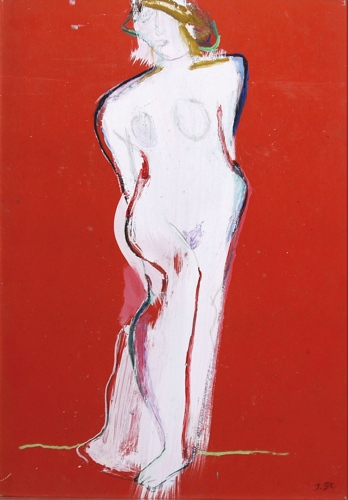 „Die Weiße Dame“, großes Ölgemälde/Mischtechnik auf Malkarton, monogrammiert, um 1960/70. Der junge Josef Steiner schuf um 1935 ein motivgleiches Ölgemälde mit dem Titel „Die weiße Dame“. Dieses 90 x 140 cm große Ölgemälde wurde von den Nationalsozialisten auf einer „entarteten“ Kunstausstellung in Berlin gezeigt, mit „Spott und Schande“ überschüttet und gilt seitdem als beschlagnahmt und verschollen. Der alte Josef Steiner ließ mit dieser wiederholten Aktkomposition sein Künstlerleben Revue passieren. Er schildert hiermit eine nackte Frau mit symbolisch weißem Inkarnat, die sich grazil auf den Betrachter hinbewegt. Der Gang, die Schulterhaltung und vor allem der Gesichtsausdruck wirken erhaben und zugleich verklärt im Sinne der „Hofer-Gestik“. Das künstlerisch elitäre Weiß des nackten Frauenkörpers wird mit intensiven Blau- und Rottönen belebend konturiert und zugleich mit einem erotisch roten Fond kontrastiert. Neben der gezielt überzeichnet kräftigen Frauenwade, quasi als Reminiszenz an sein geliebtes Berliner Aktmodell, erhält dieser Frauenakt ein weiteres zeitgenössisches Etikett mit Symbolkraft: Steiners Akt erscheint mit zeittypisch hochmodernem Stirnband des Art déco bzw. der „Goldenen Zwanziger“, die auch in der Berliner Metropole in berauschender Lebendigkeit zum Ausdruck kamen. In diesen „Goldenen Zwanziger“ und frühen 1930er Jahre bündelten sich Lebensglück und höchster Erfolg von Josef Steiner in seiner Berliner Hochblütezeit. Steiners Akte bildeten nicht nur das Fundament seines hohen Bekanntheitsgrades, sondern auch mehrheitlich das unverkennbare Sujet des Erfolgs. Auch bis zu seinem Tod blieben Steiners Akte das leidenschaftliche Hauptthema seines Gesamtwerks.